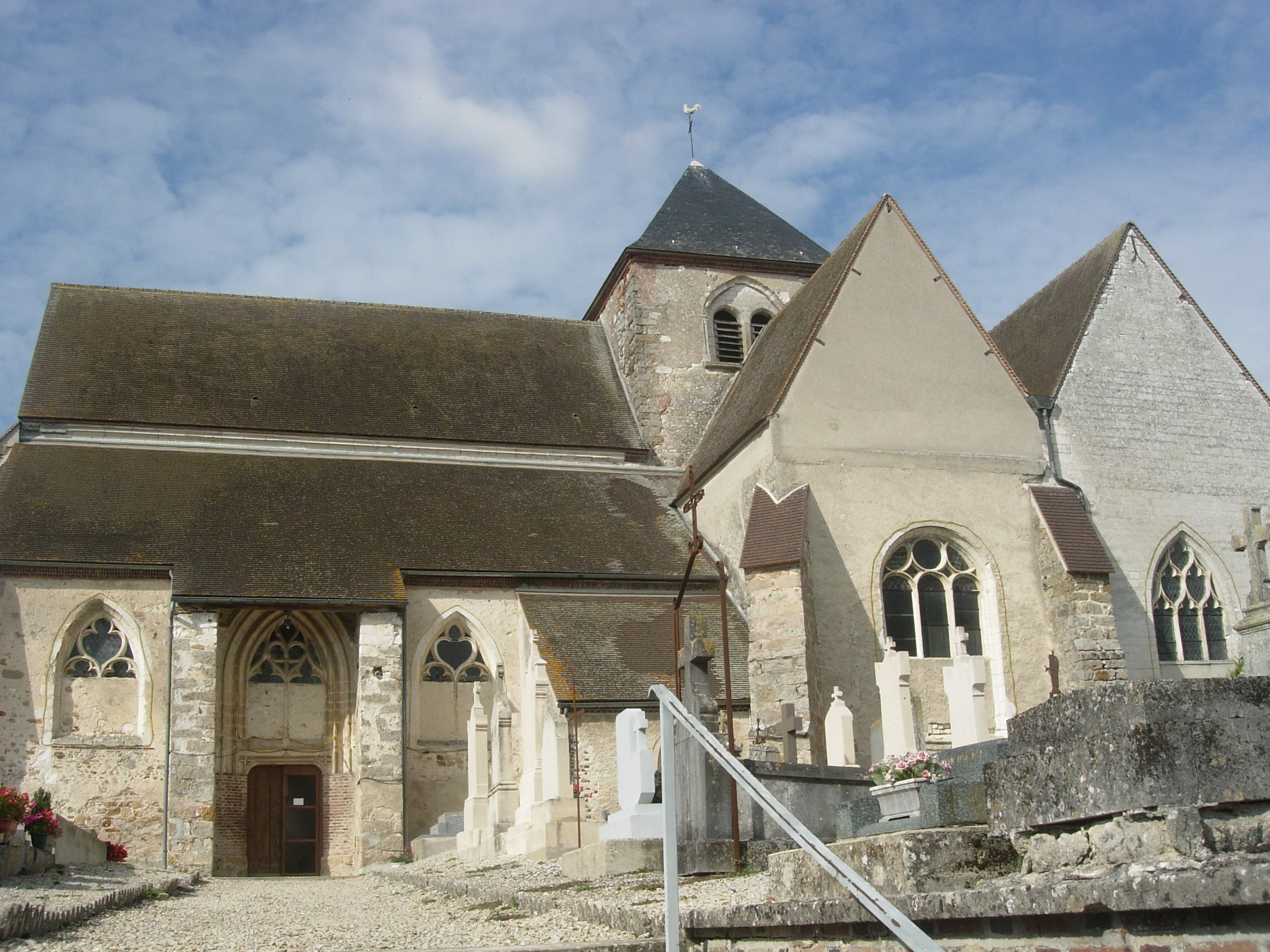 Eglise de Saint Lupien